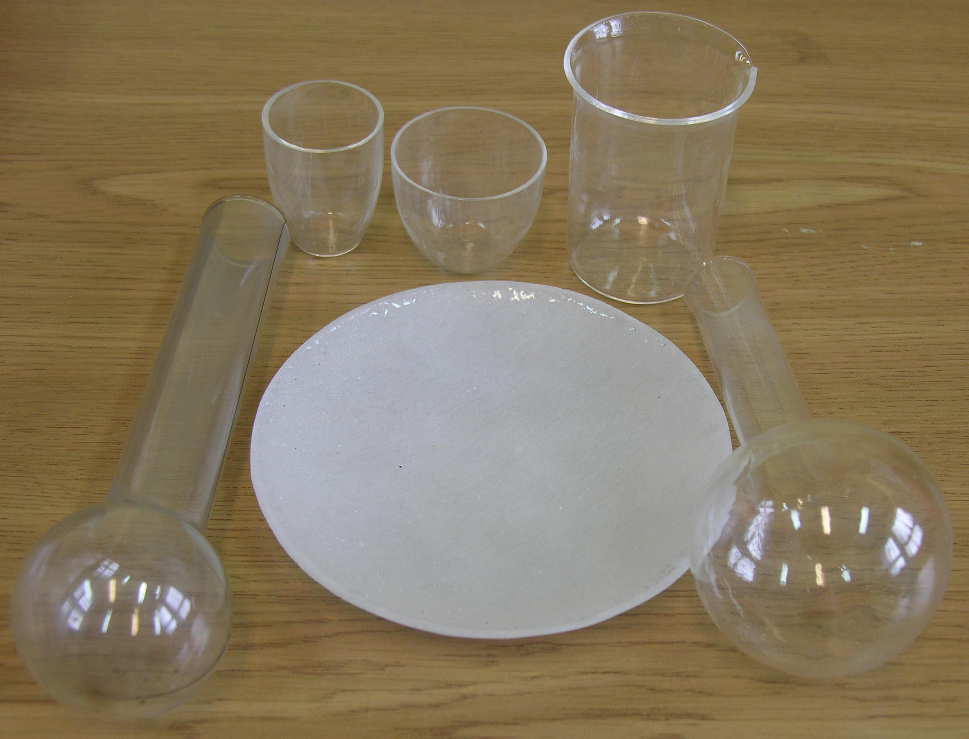 Zdjęcie przedstawiające naczynia laboratoryjne ze szkła kwarcowego English | Polski | +/−